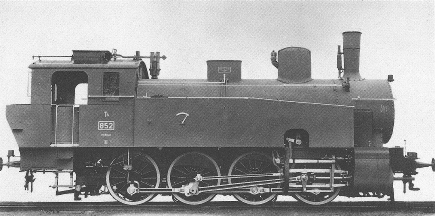 Dampflokomotive Württembergische T 4.